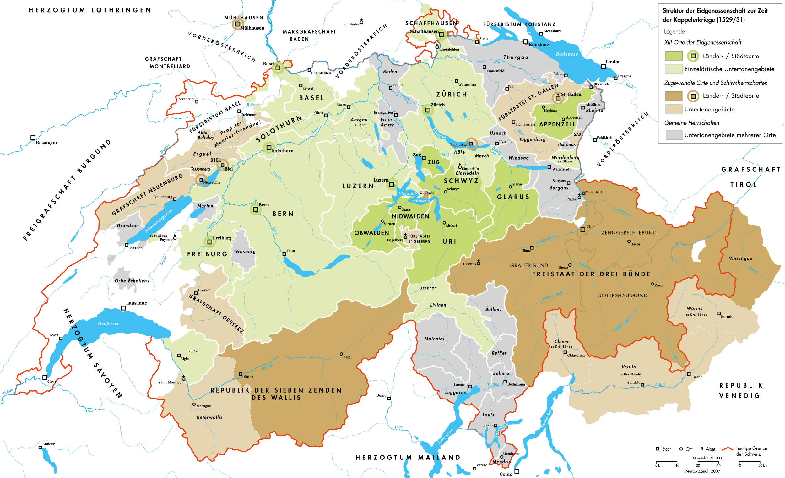 Die Struktur der schweizerischen Eidgenossenschaft zur Zeit der Kappelerkriege 1529/31